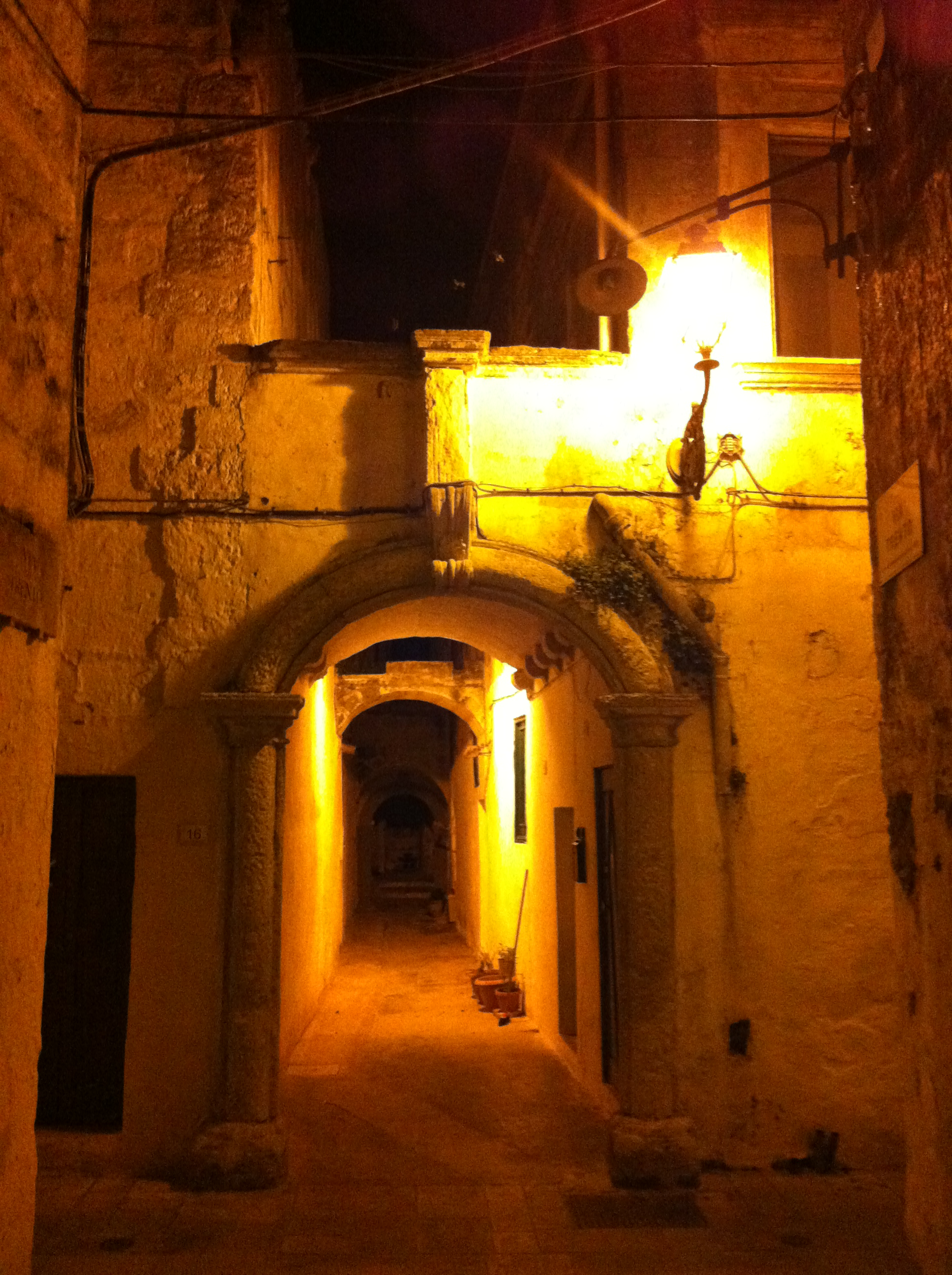 Portale risalente al 1600 del palazzo Schito, oggi proprietà Porro Sticchi